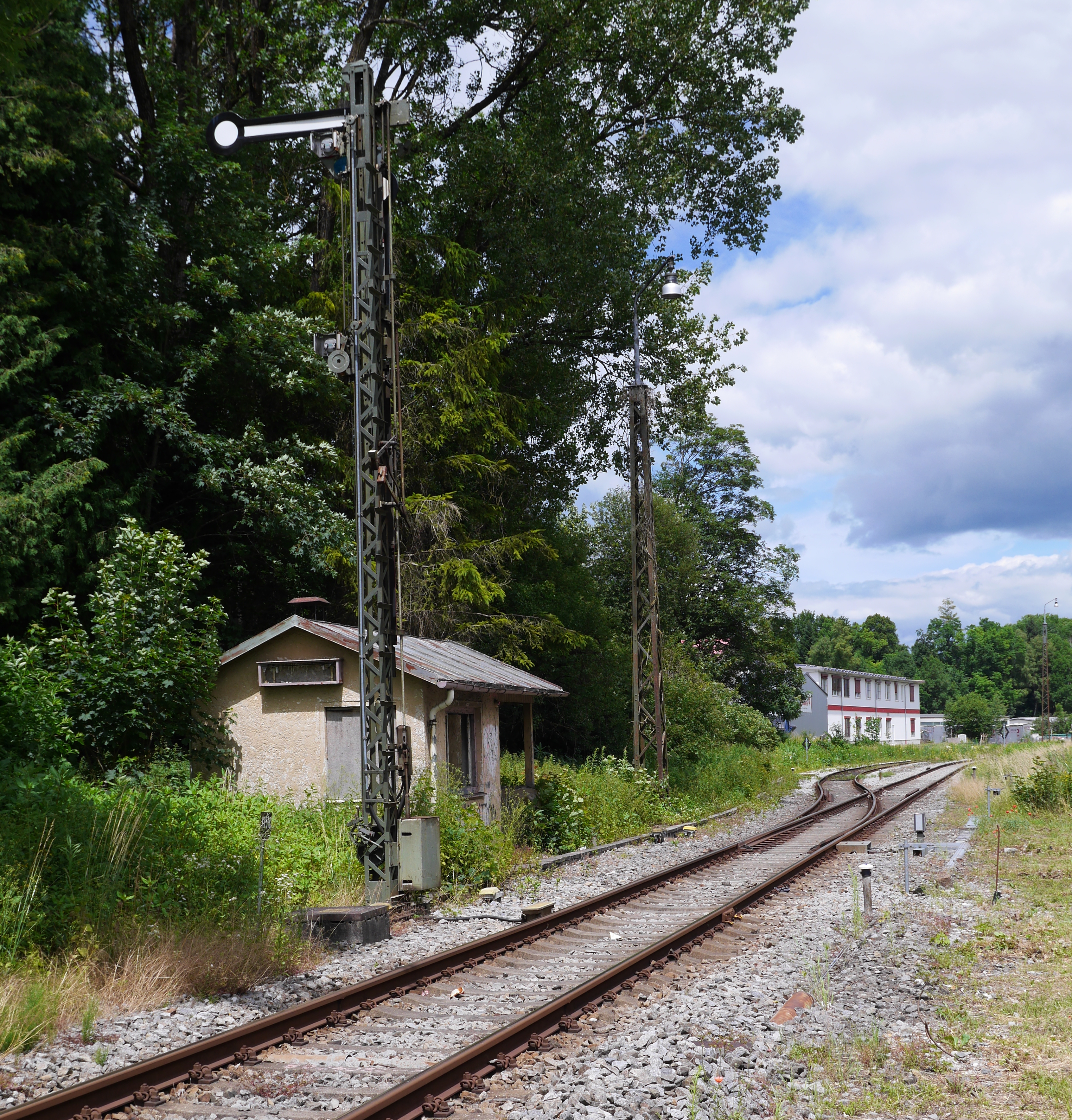 Südliches Gruppenausfahrsignal des Bahnhofs Peißenberg, dahinter die Ruine des stillgelegten Wärterstellwerks II